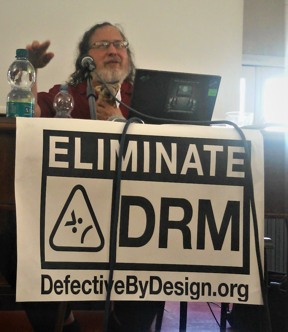 Giornata internazionale contro i DRM (International#DayAgainstDRM - conferenza Richard Stallman - Palazzo Ducale (Genova 9 luglio 2017)